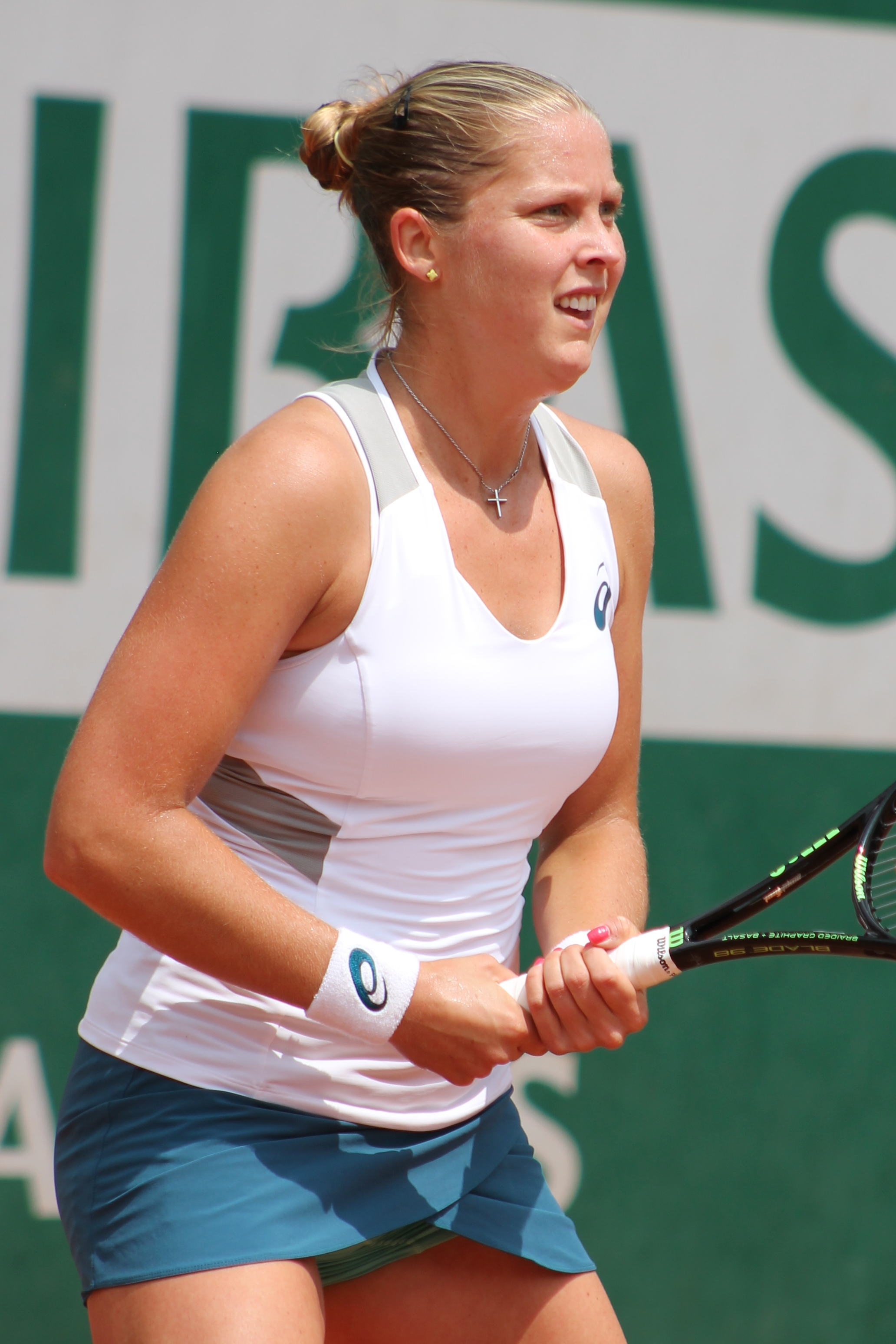 Rogers RG16 (10)